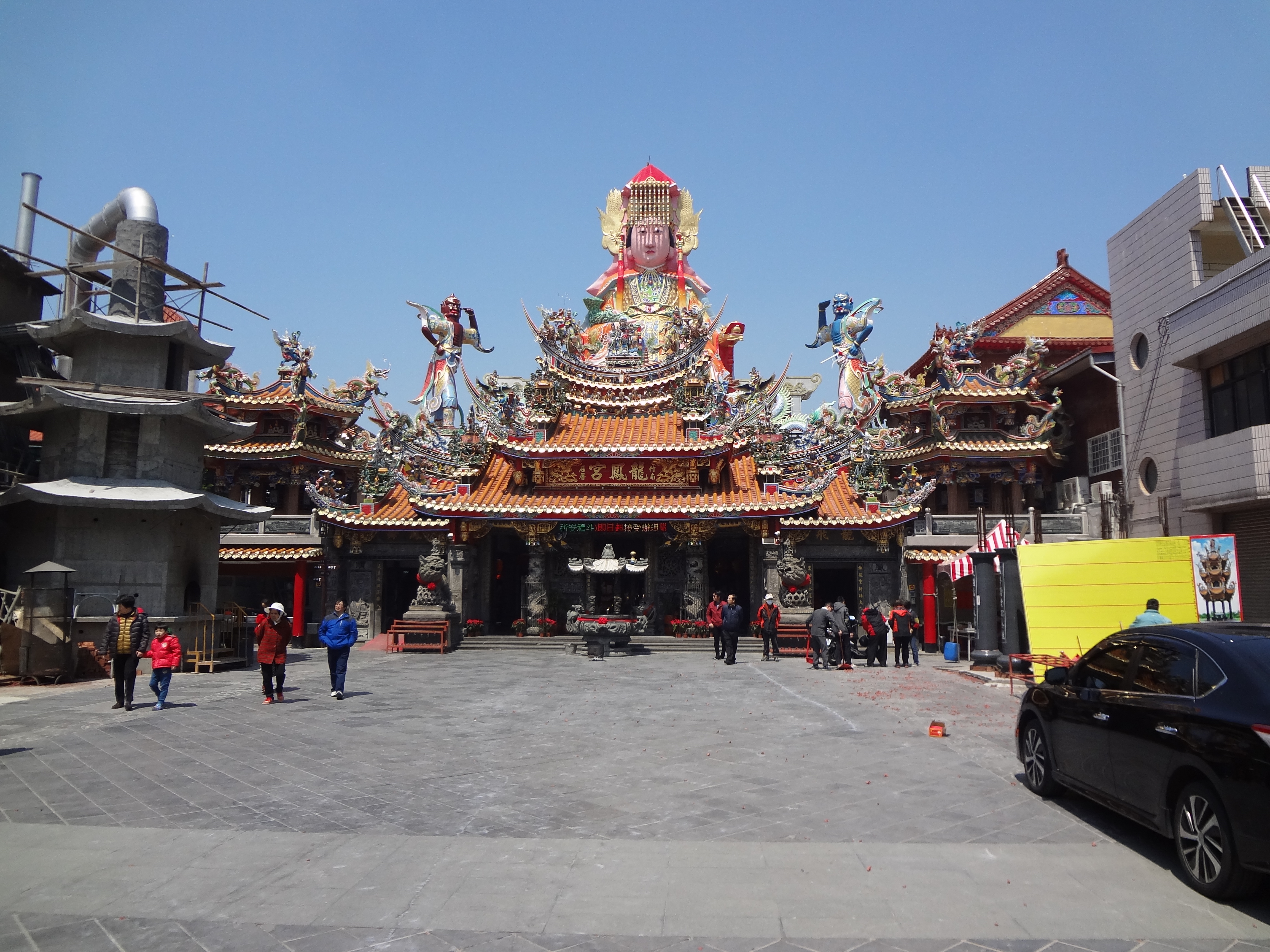 竹南后厝龍鳳宮，位於臺灣苗栗縣竹南鎮龍安街69號。